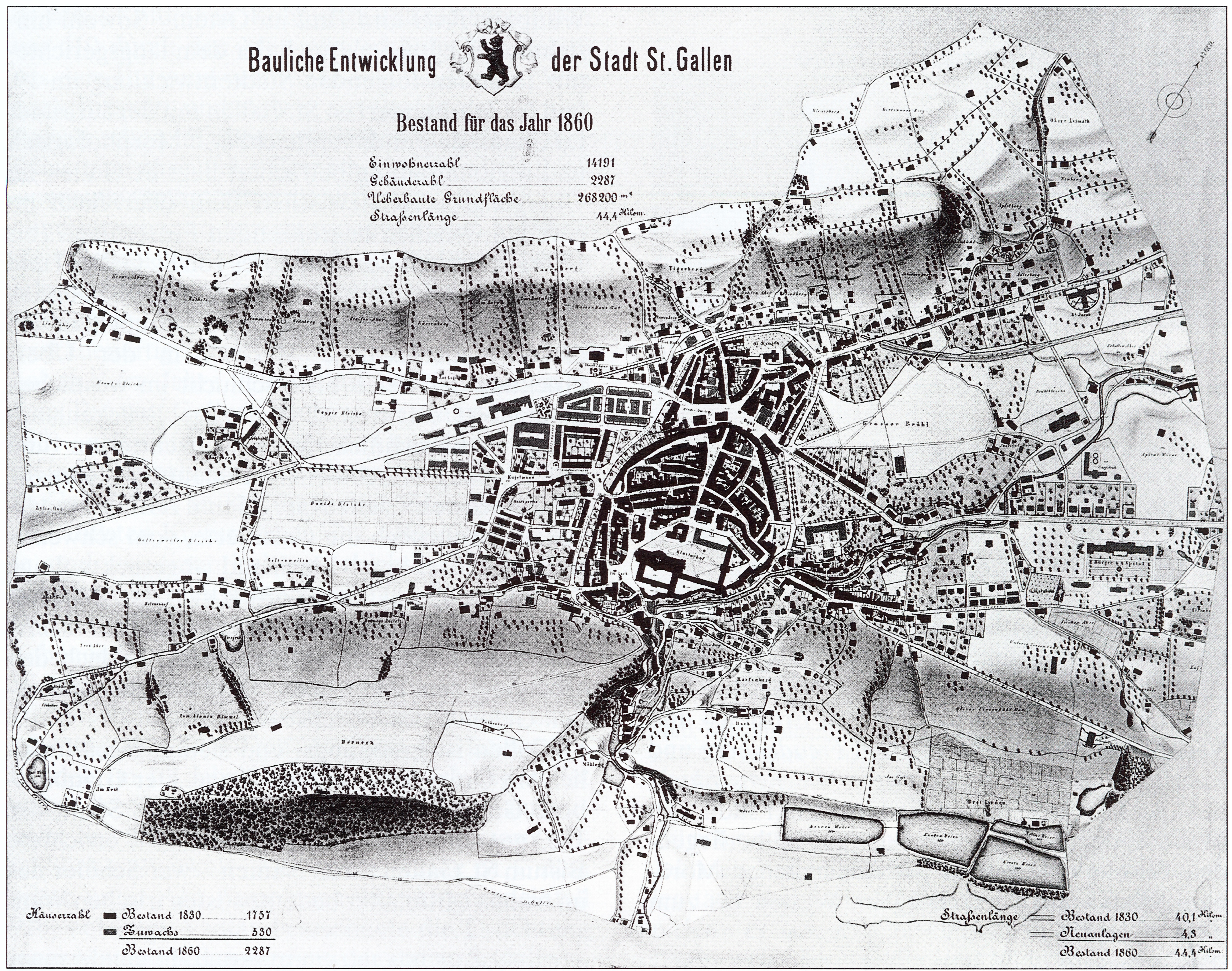 “Bauliche Entwicklung der Stadt St. Gallen. Bestand 1860” Aquarellierte Lithografie, erstellt von Albert Pfeiffer für die Schweizerische Landesausstellung 1883 in Zürich